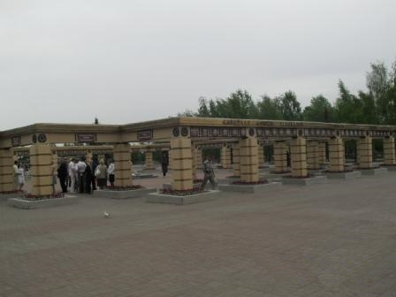 Мемориальный комплекс в Парке Победы г. Казани